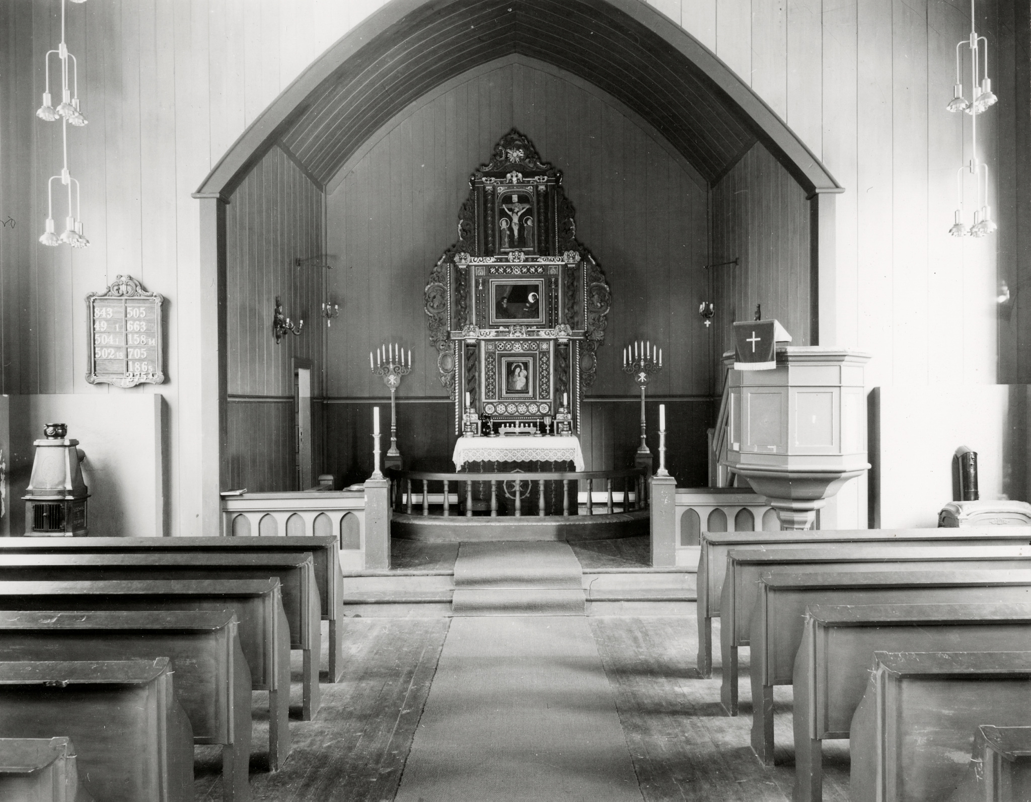 Interiør i Veggli kirke. Fra Riksantikvarens Kulturminnebilder.